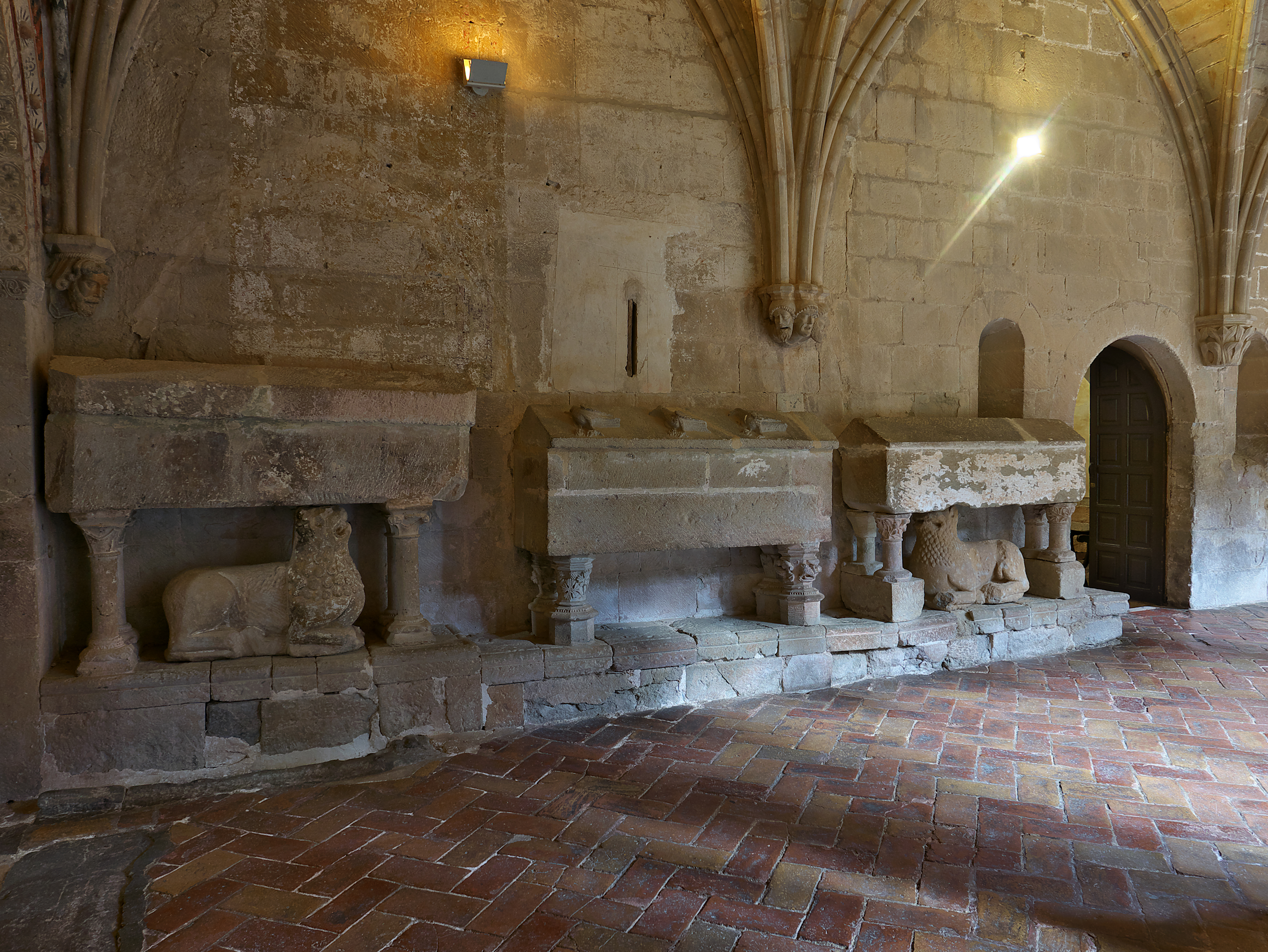 Claustro del Real Monasterio de Santa María de Veruela. Sepulcro (s. XII) de Pedro de Atarés (†1152), fundador del monasterio, y familia